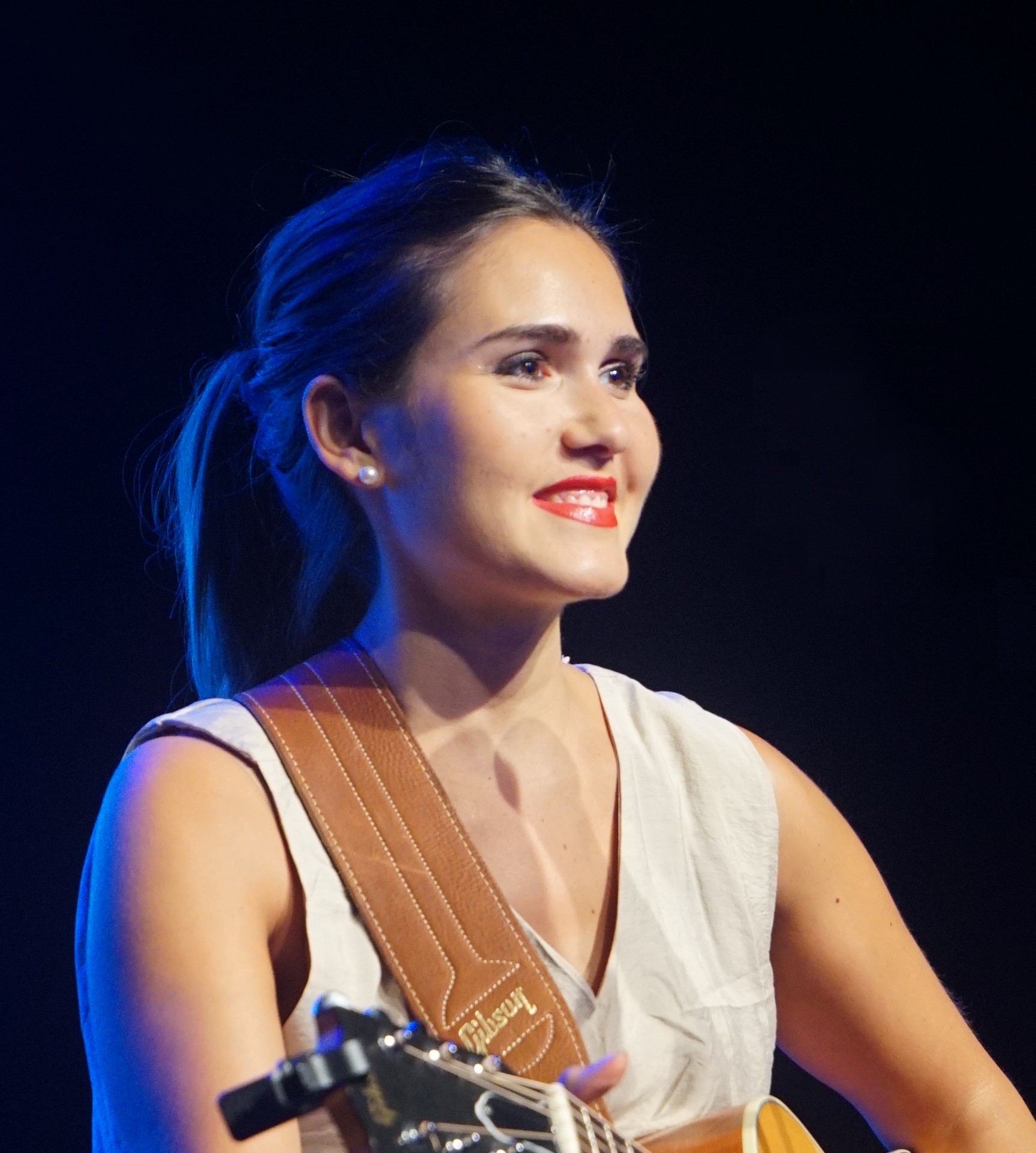 lors de la Tournée Ola Euro 2016 à Reims.